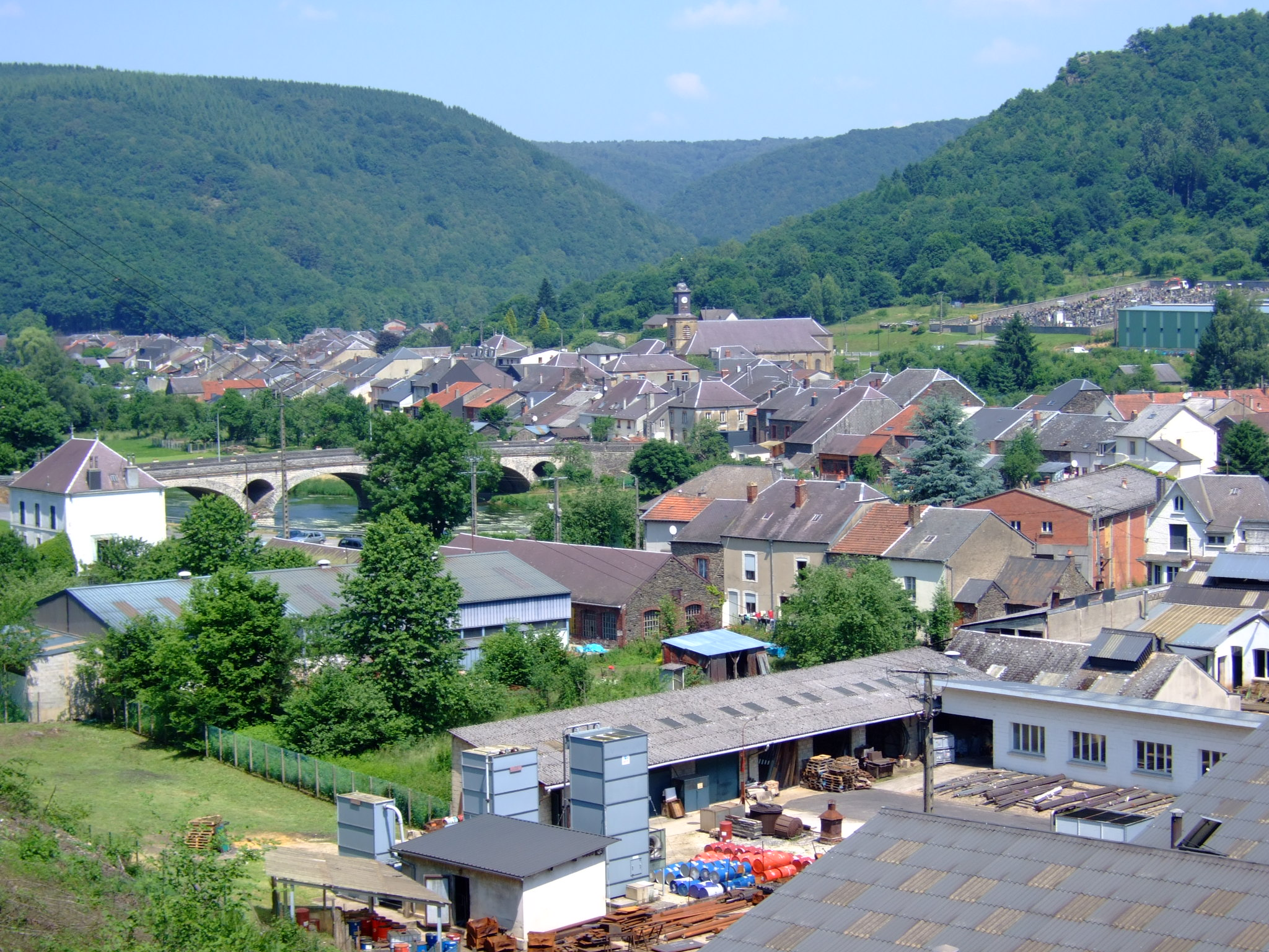 Le village des Hautes-Rivières avec les établissements Raymond Barré au premier plan